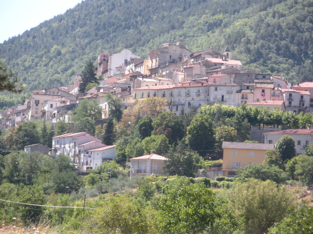 Pettorano sul Gizio (AQ) - Panorama